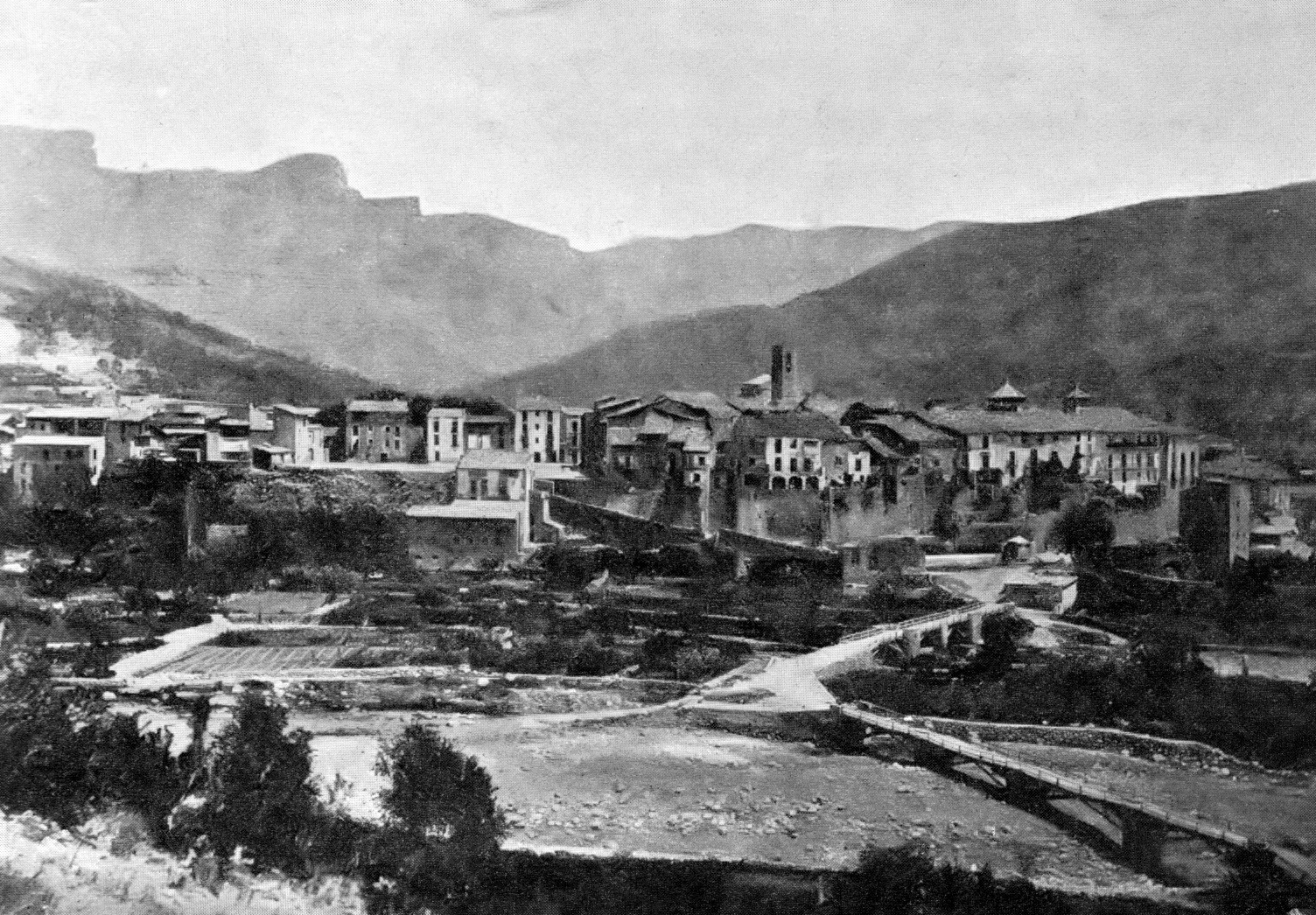 Fotografia antiga de la Pobla de Segur, vista general (Pallars Jussà)